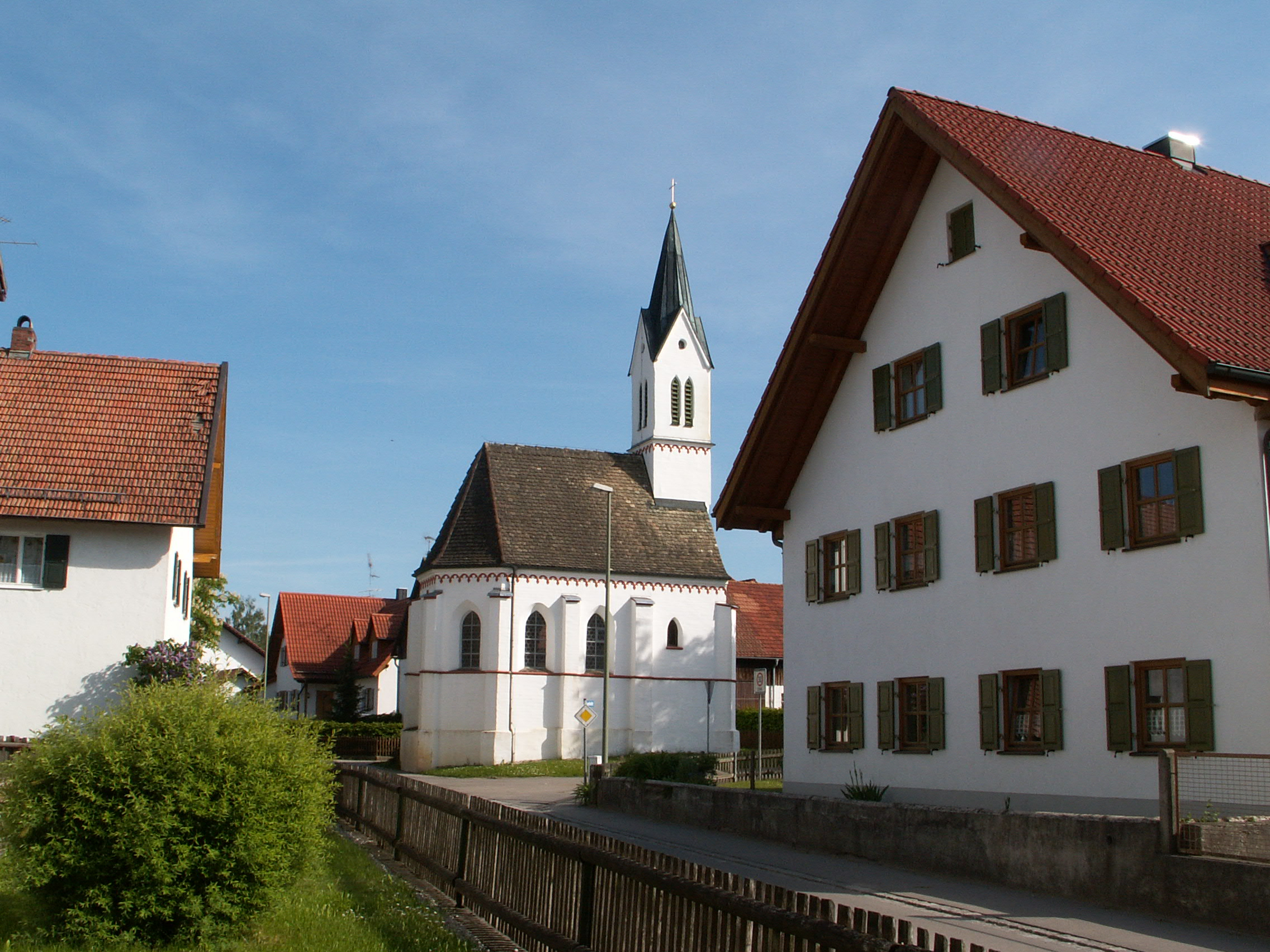 Leonhardskapelle in Schwabhausen, Weil